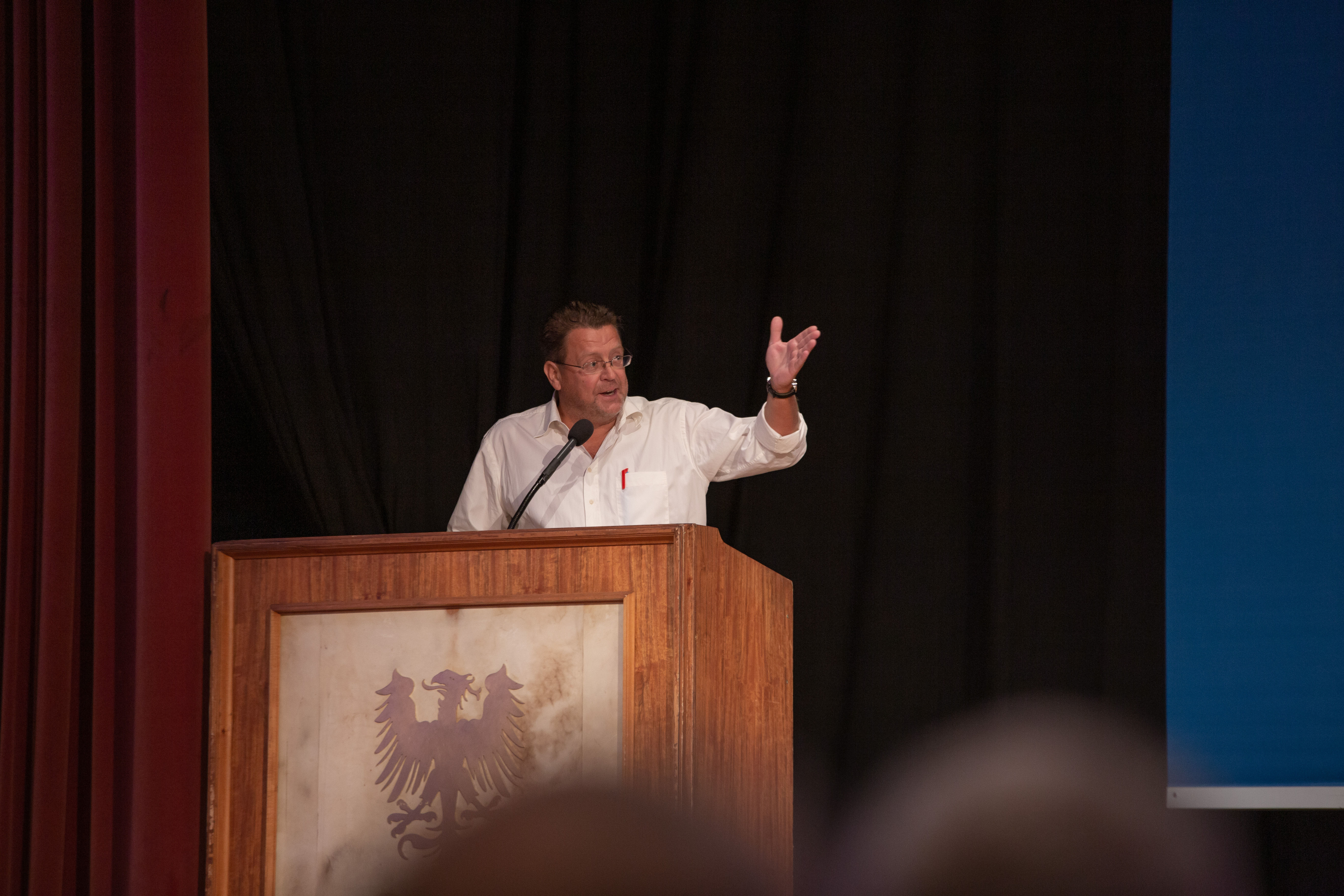 Landesparteitag der AfD-Thüringen am 19. August 2019 in Arnstadt